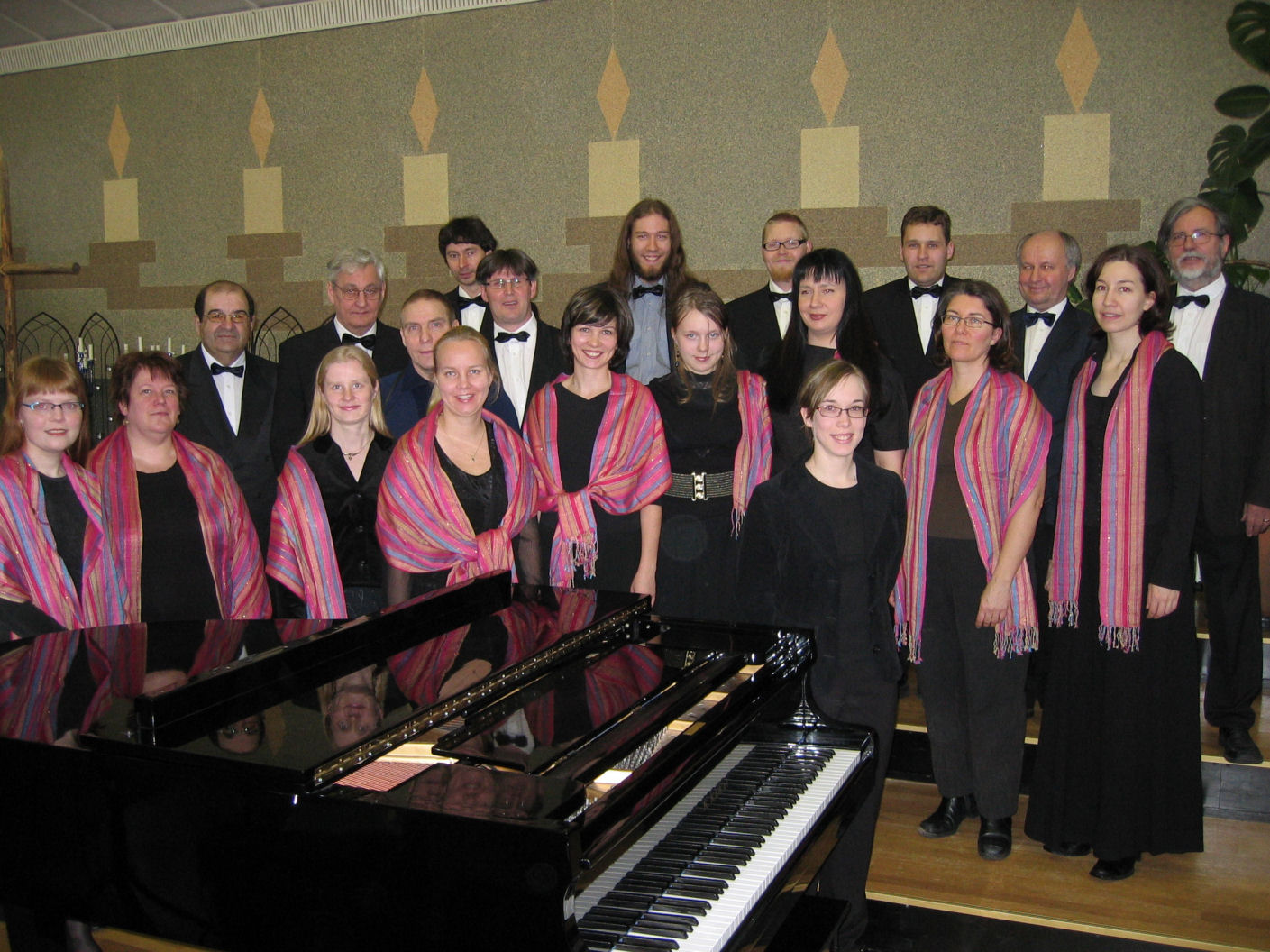 Christianus-kuoro